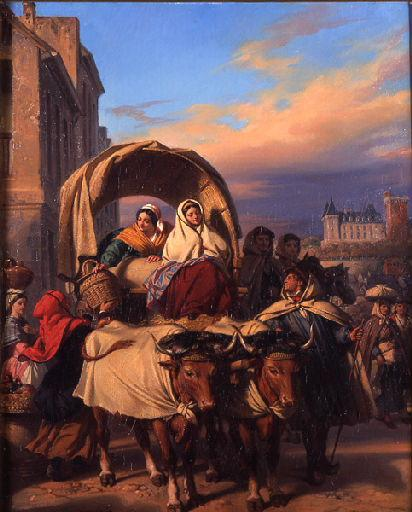 Le retour du marché par Eugène Deveria, Pau.